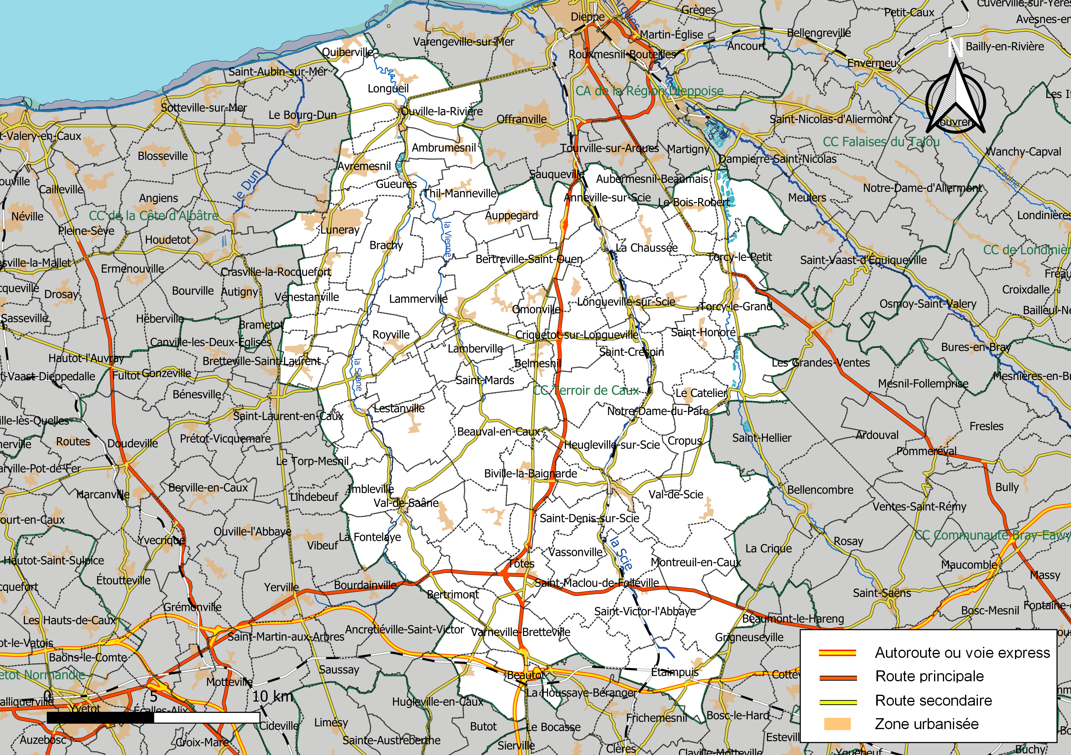 Carte géographique de la Communauté de communes Terroir de Caux, département de la Seine-Maritime, France. Composition au 1er janvier 2019.